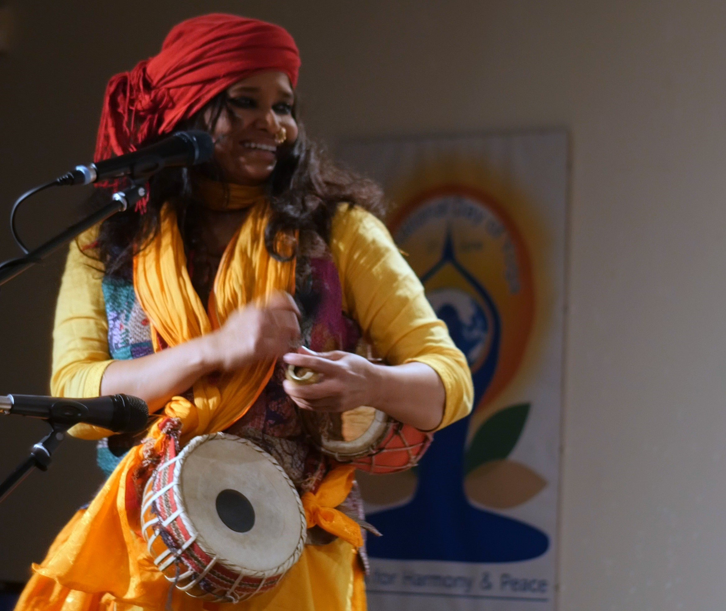 Papia das baul, Mezinárodní den jogy 2016, Praha